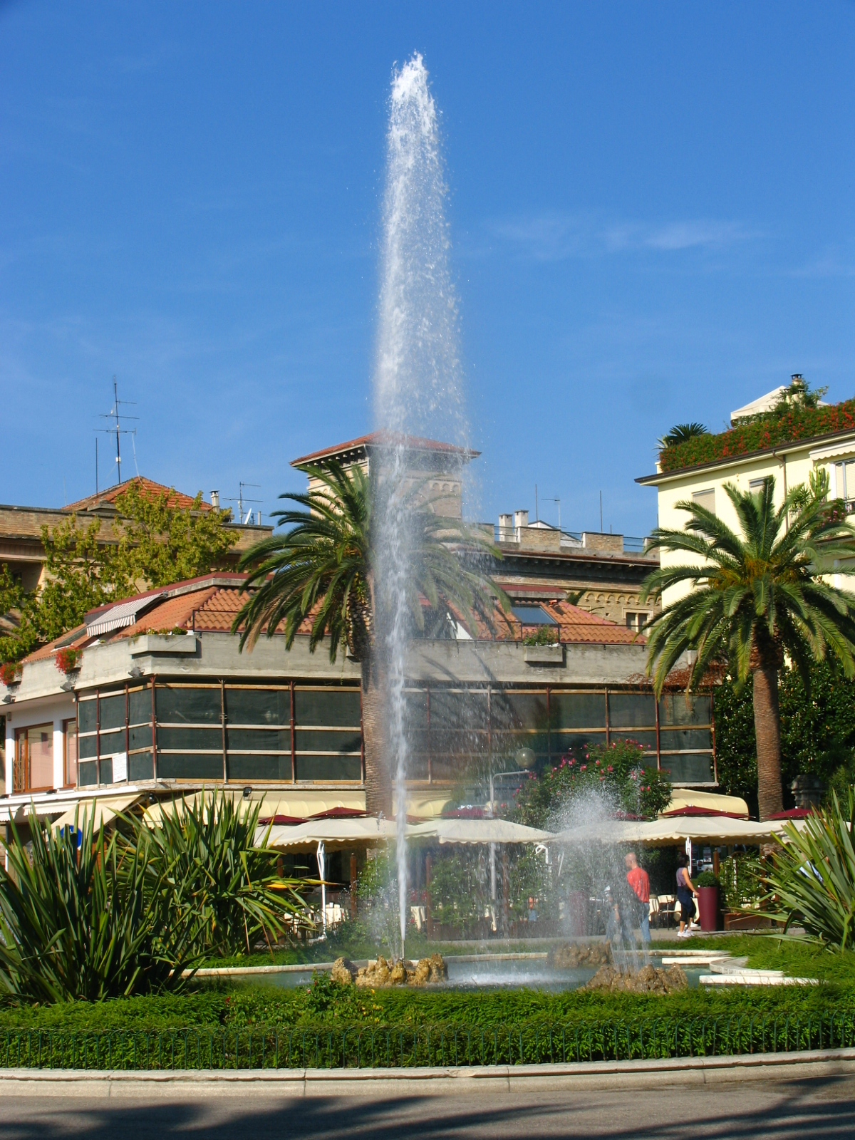 San Benedetto del Tronto, Marche, Italia